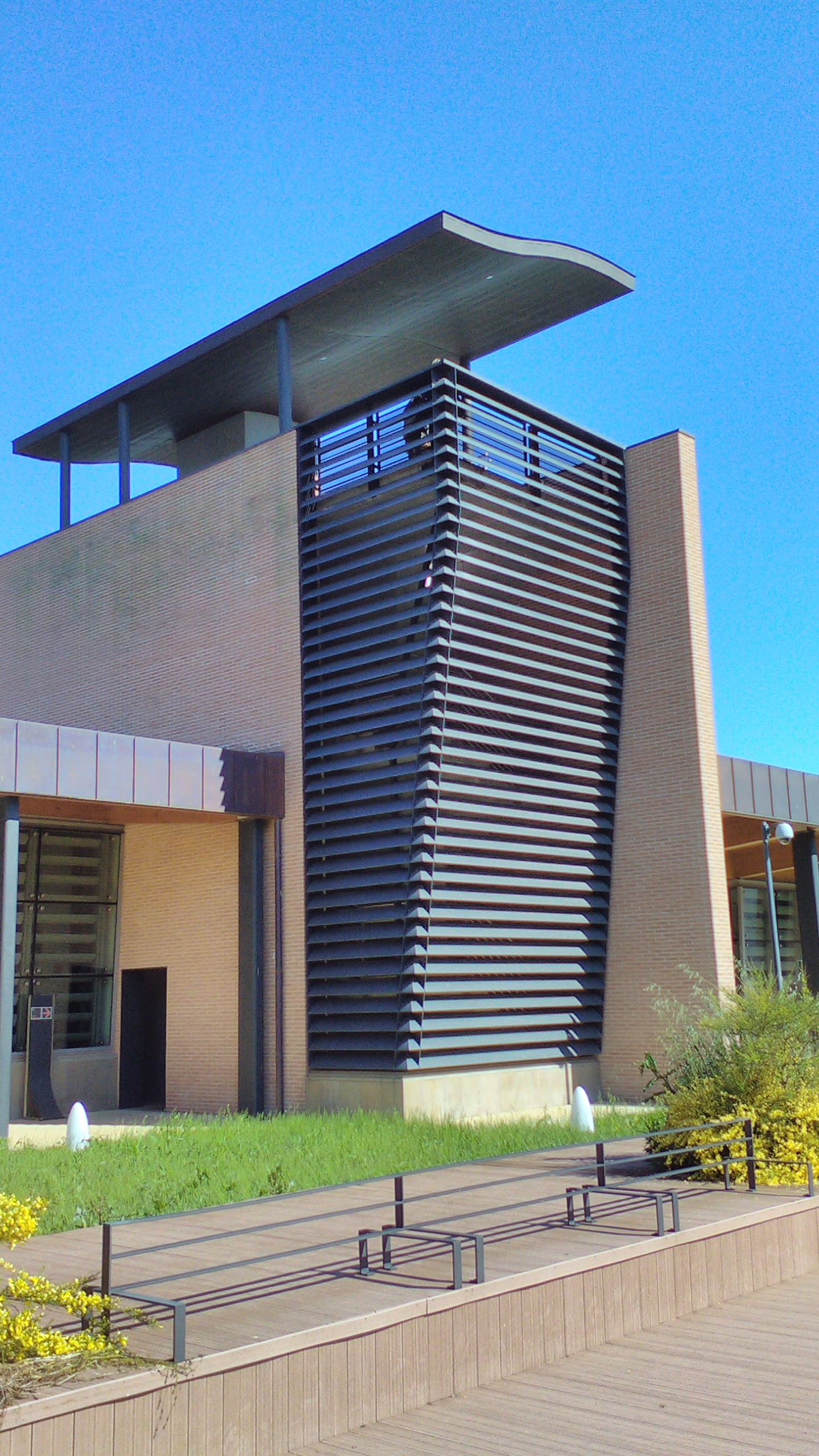 Museo Archeologico Nazionale di Altino